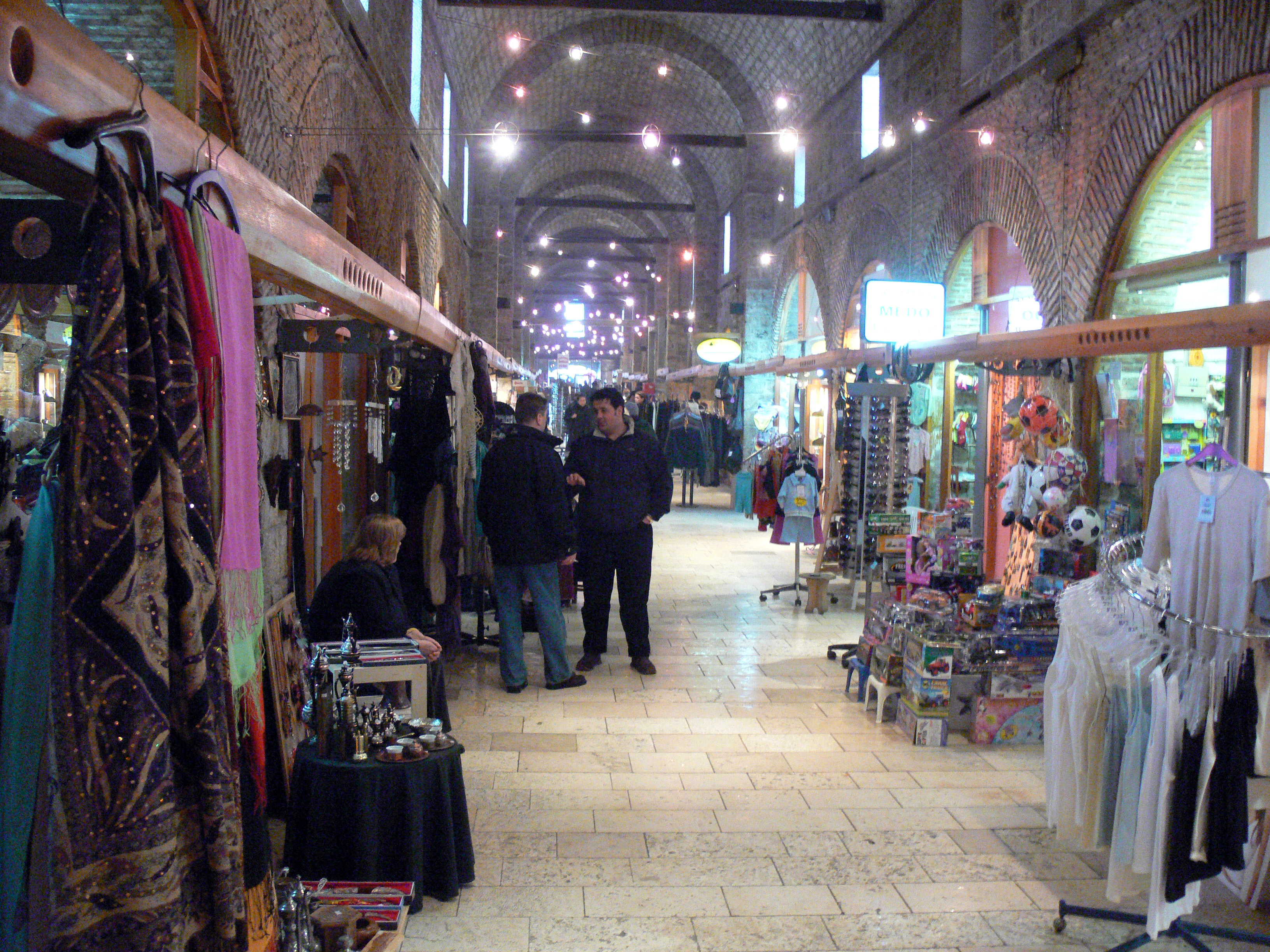 The Gazi-Husrev-Beg-Bazaar.